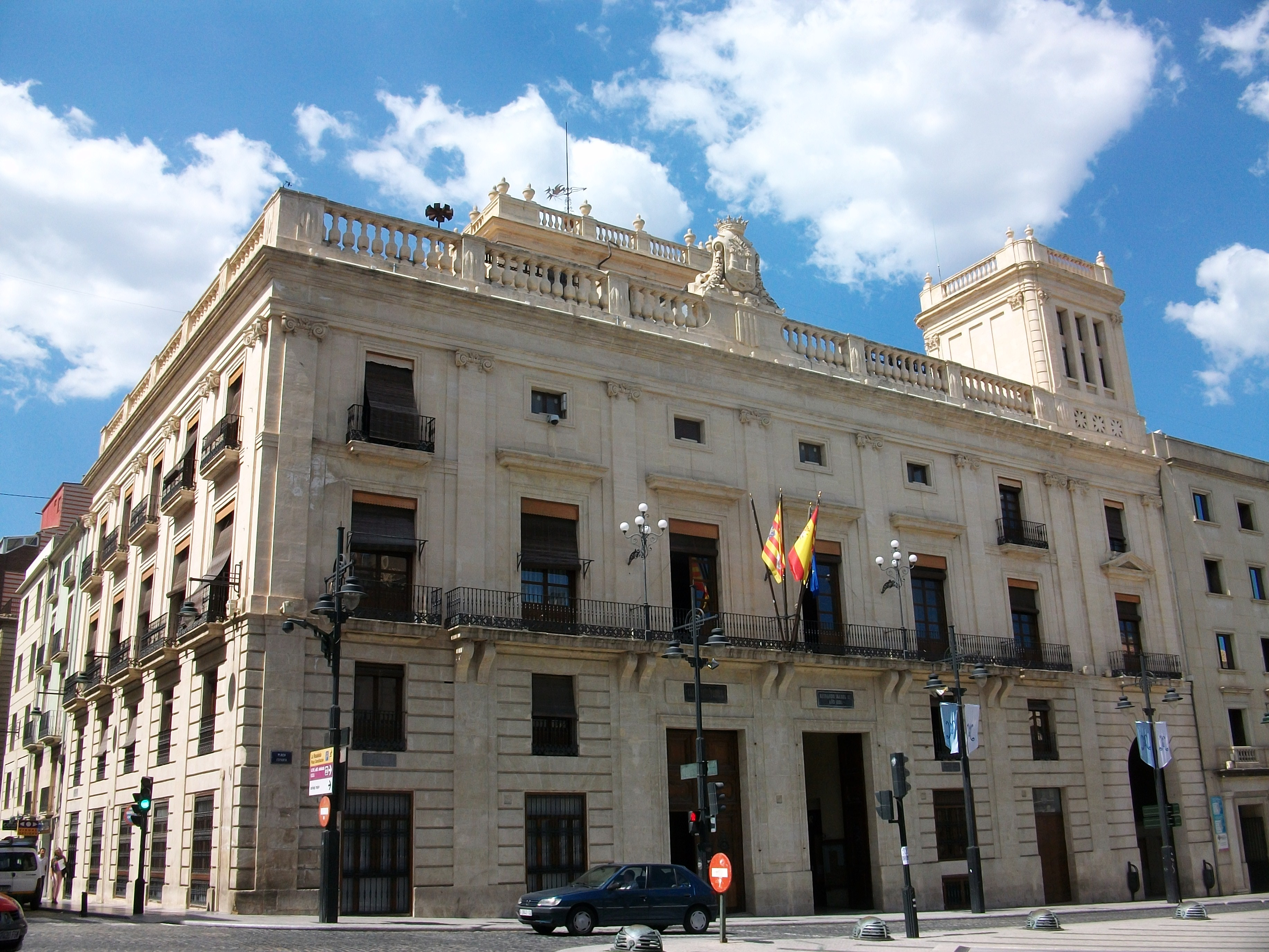 Ajuntament d'Alcoi.